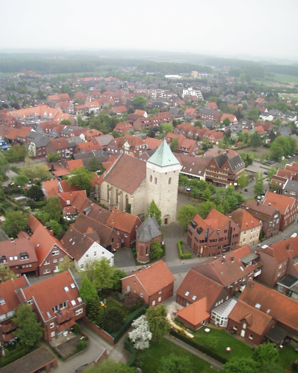 Schrägluftbild von Everswinkel; aufgenommen aus einem Heißluftballon